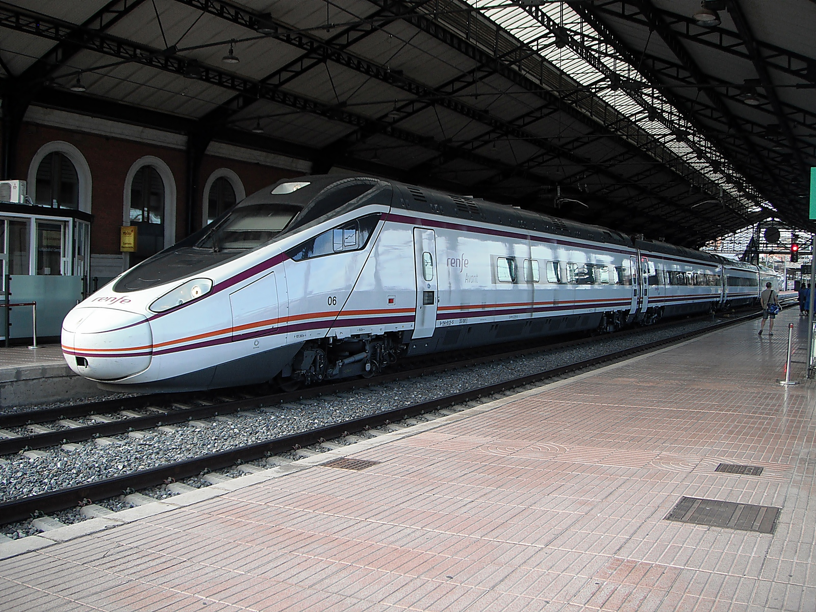 Tren de la serie 114 "Velocirraptor" estacionado en Valladolid